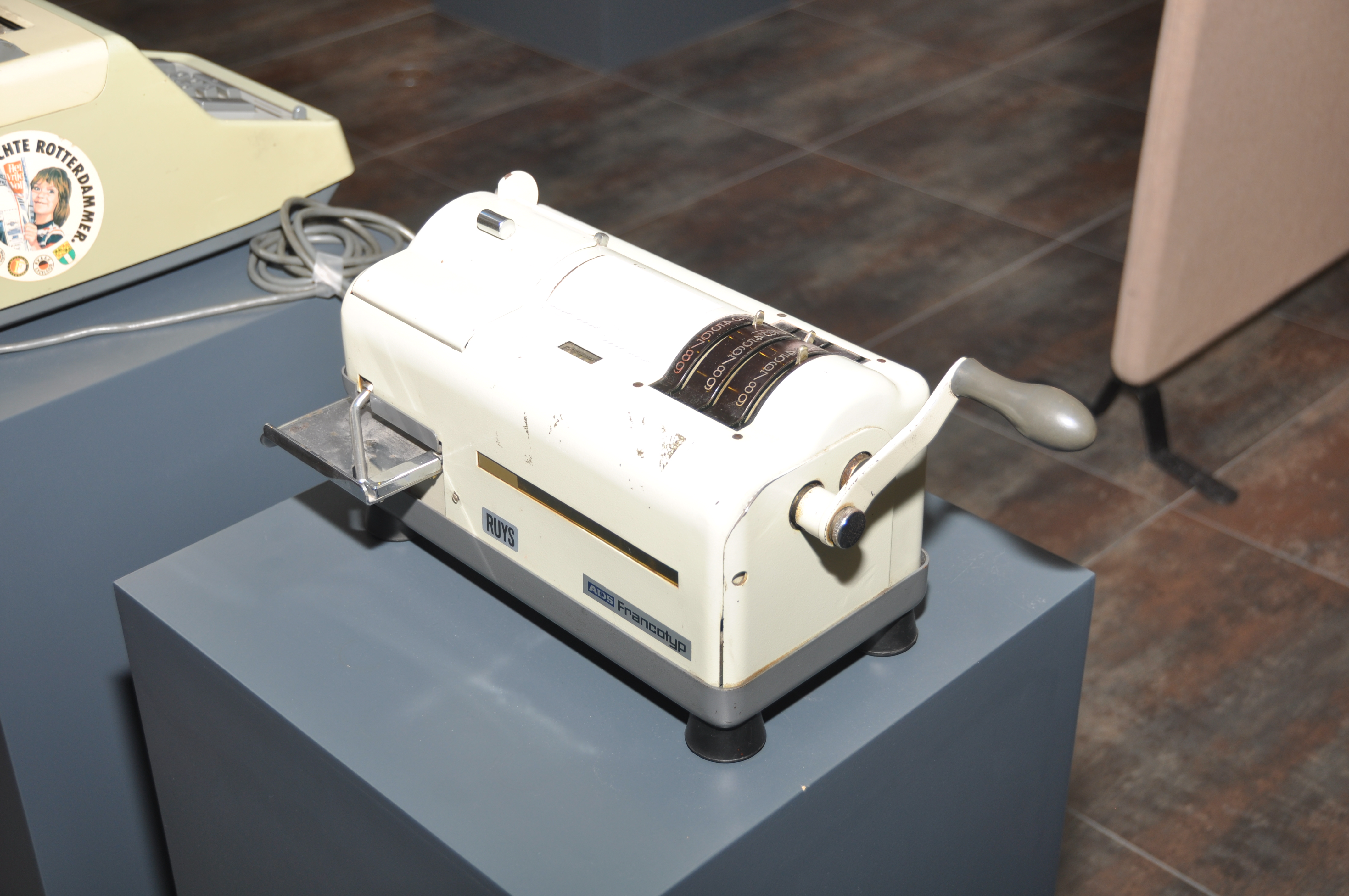 De machines van de werf op de open dag van Damen Gorinchem op 09-11-2013.